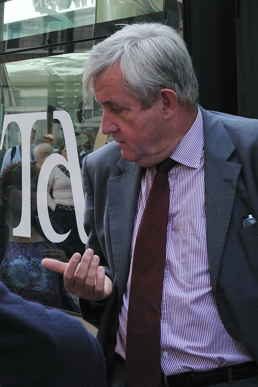 Charles-Éric Lemaignen, président de la Communauté d'agglomération Orléans Val de Loire, lors de la présentation des nouvelles rames de tramway, Orléans, Loiret, France